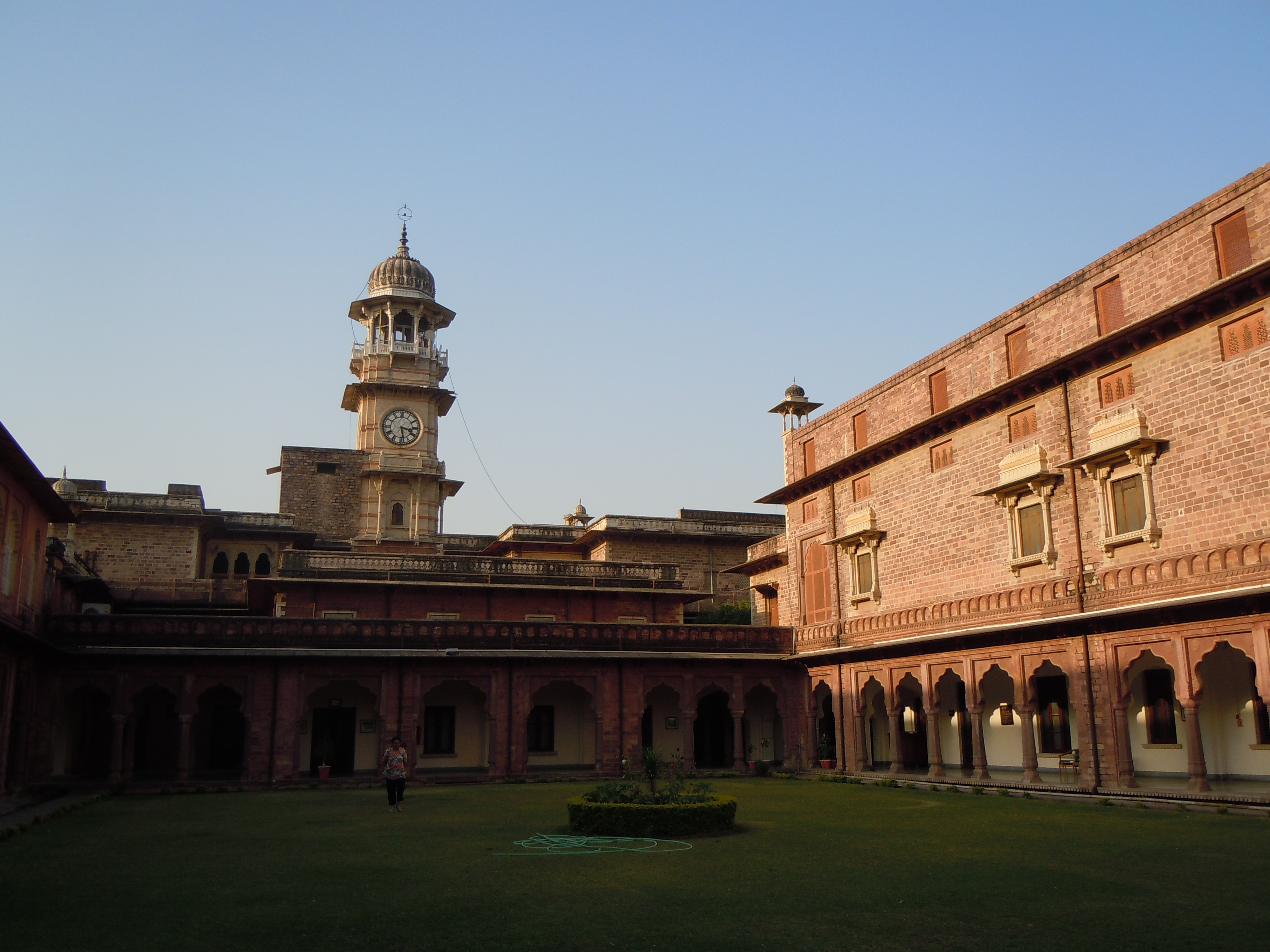 Umed Bhawan Palace cour interieure, Kota, Rajasthan